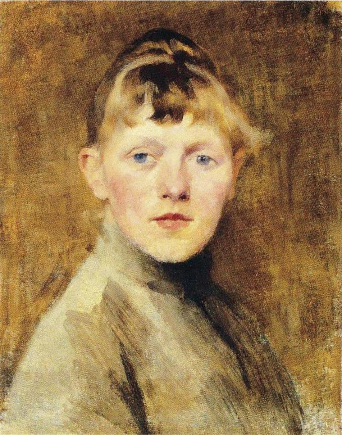 Schjerfbeckin omakuva vuosilta 1884–1885.